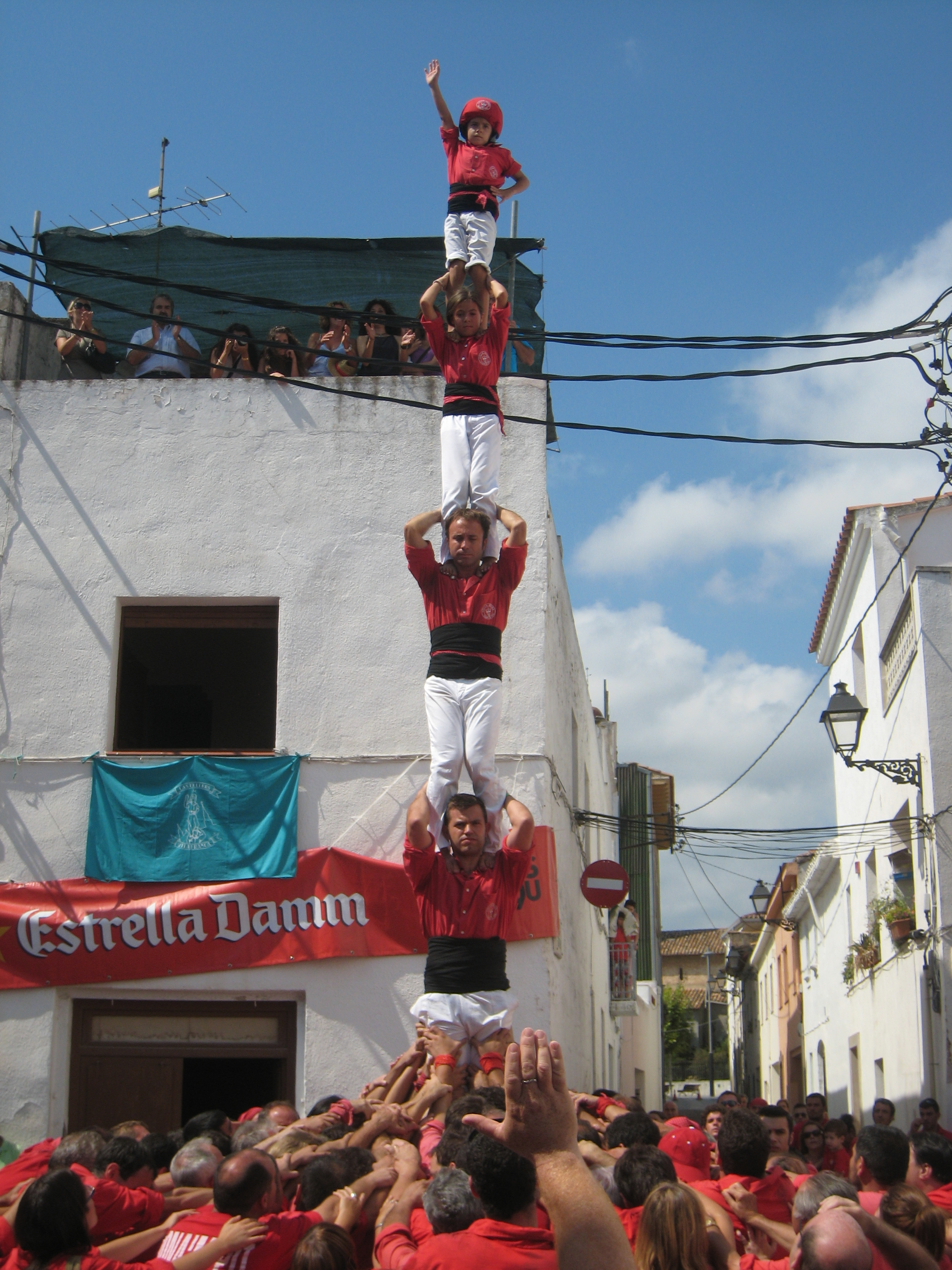 Pilar de 5 fet per la Colla Joves Xiquets de Valls durant la ronda de pilars de la diada castellera de la Festa Major de La Bisbal del Penedès.